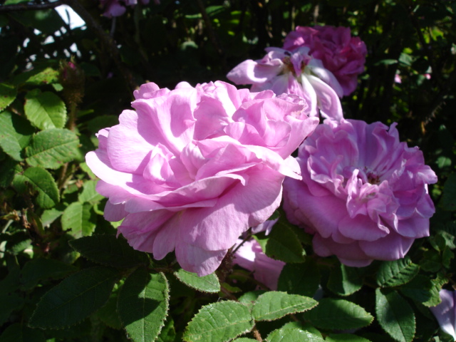 Rosa Moss 'Coralie'